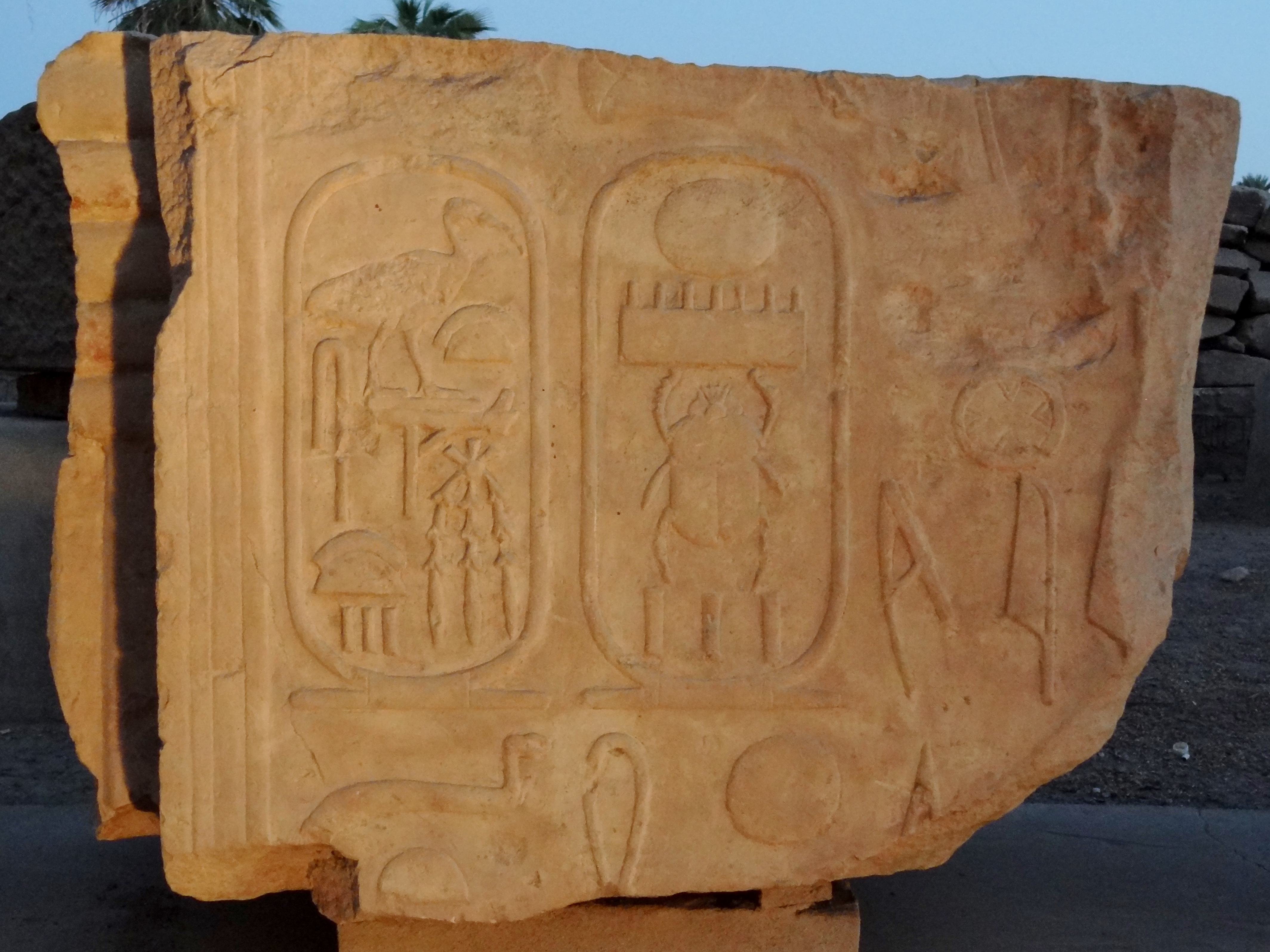 Stein mit den Kartuschen Thutmosis’ IV. neben dem Barkensanktuar des Luxor-Tempels, Ägypten